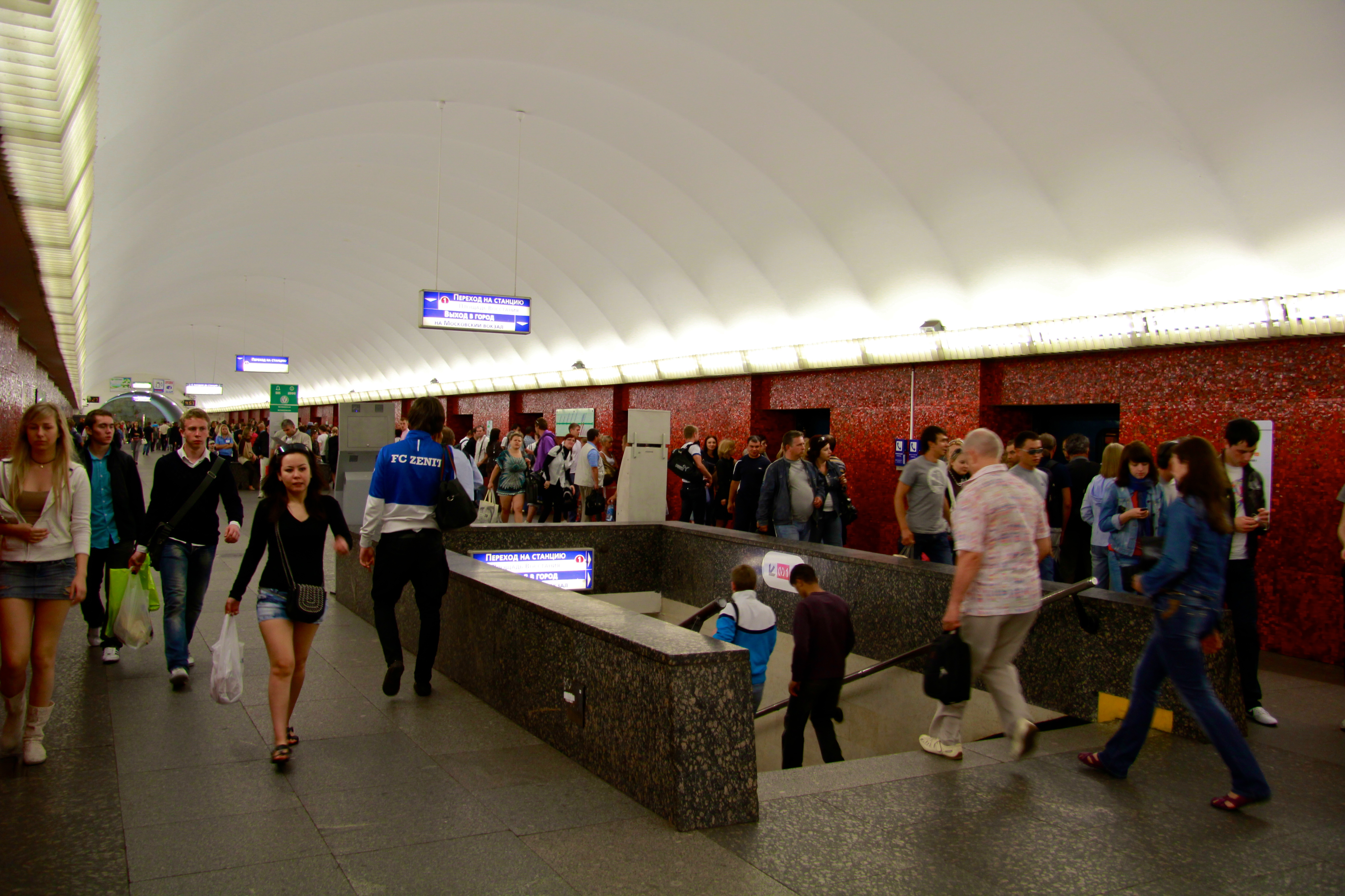 St. Petersburg Metro (Петербургский метрополитен) Kirovsko-Vyborgskaya Line (Кировско-Выборгская линия)